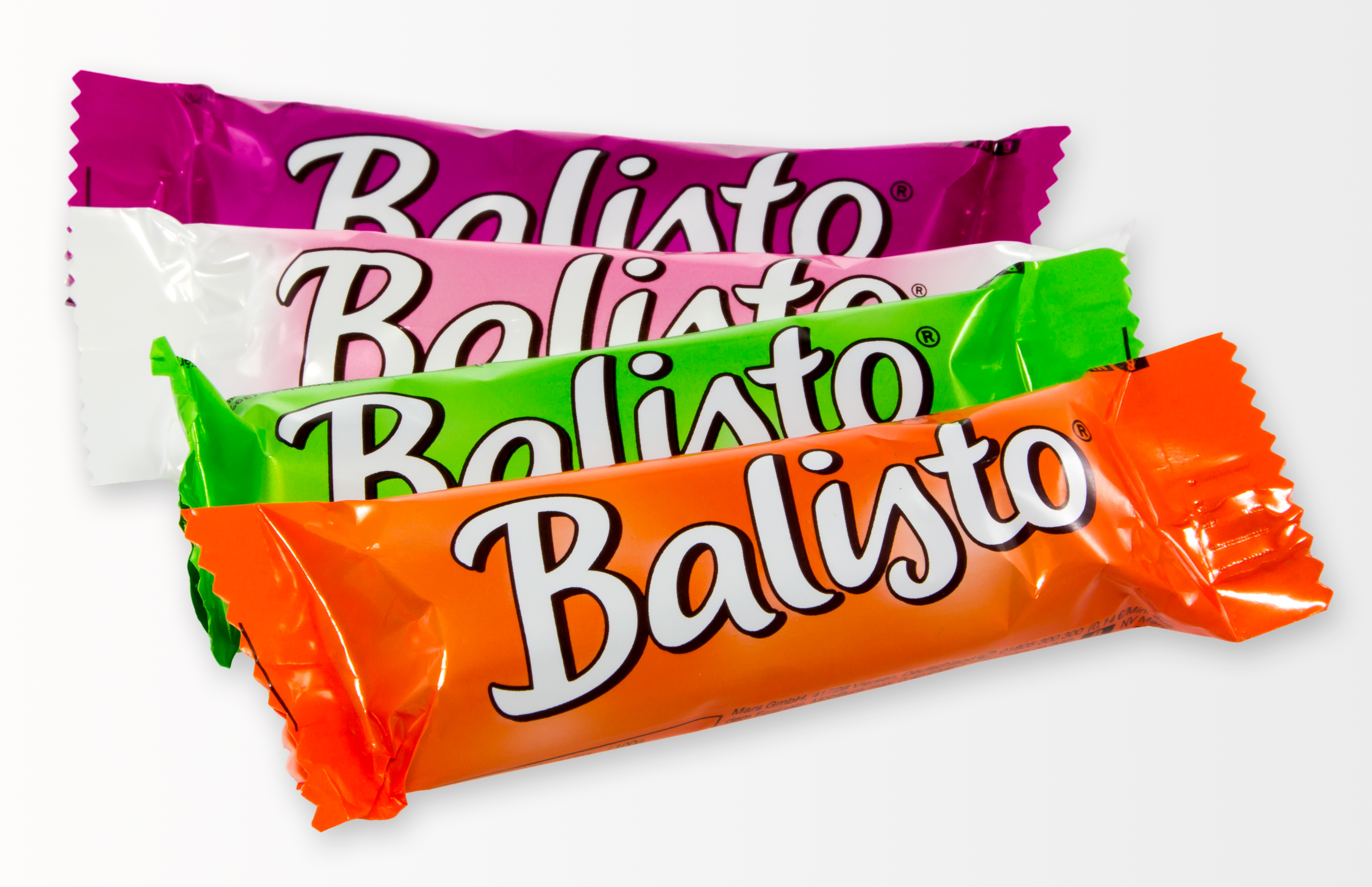 Vier Schokoriegel "Balisto" in bunter Verpackung